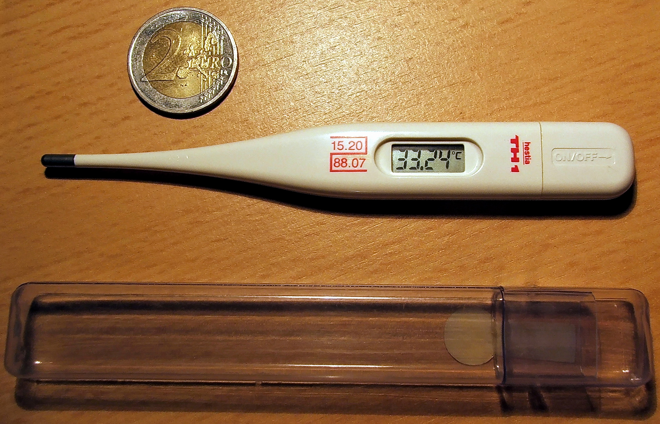 Digitales Fieberthermometer